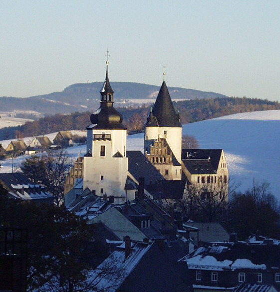 Georgenkirche und Schloss Schwarzenberg